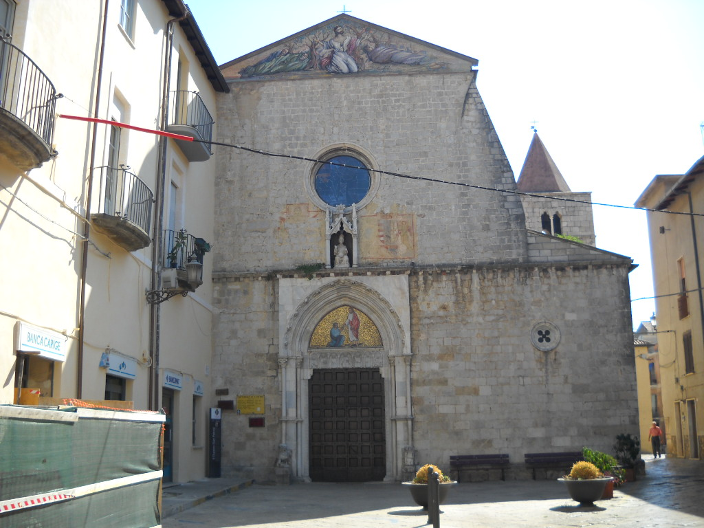 Fondi Duomo (Cattedrale di San Pietro)